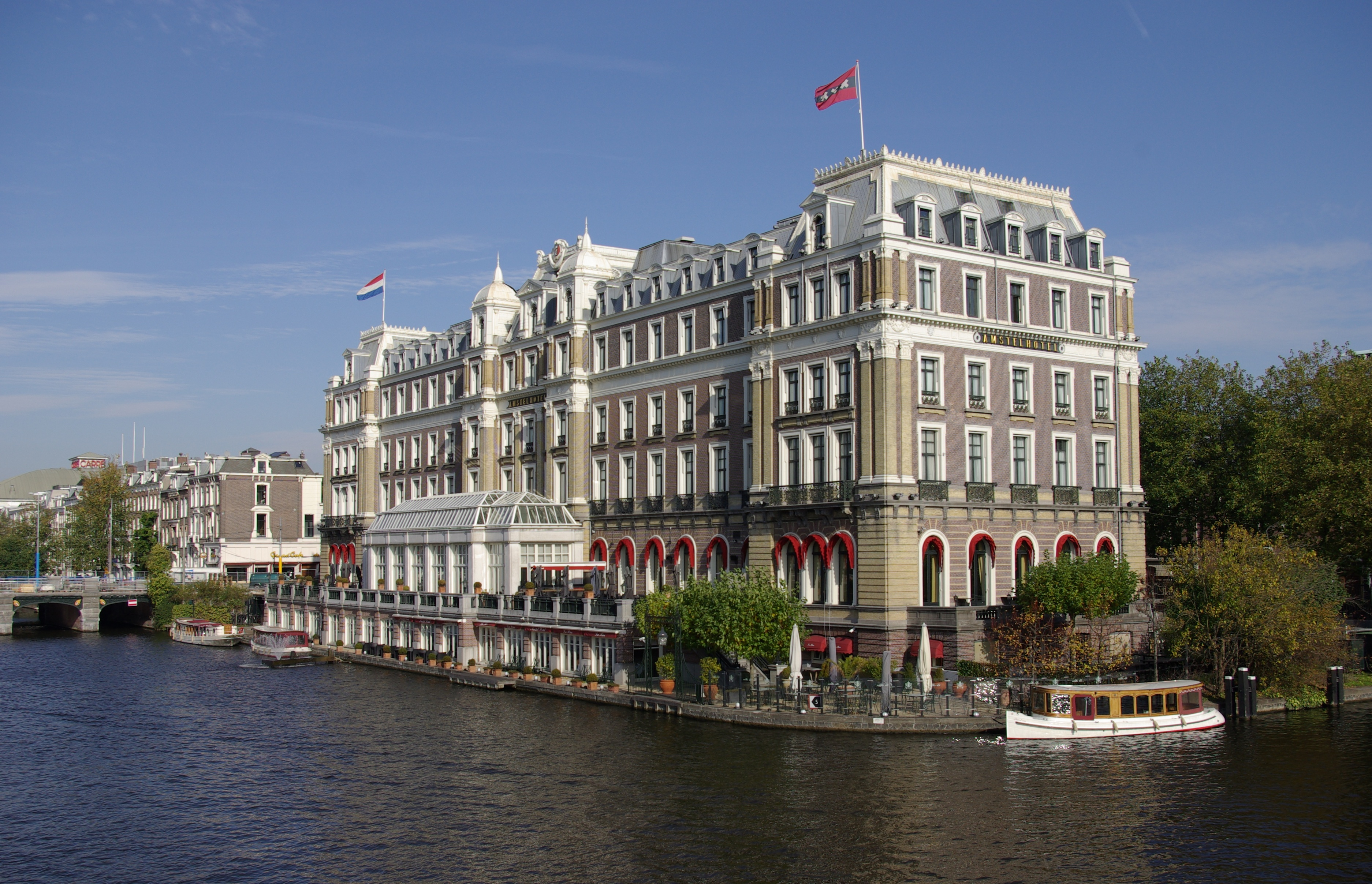 Das Amstelhotel in Amsterdam